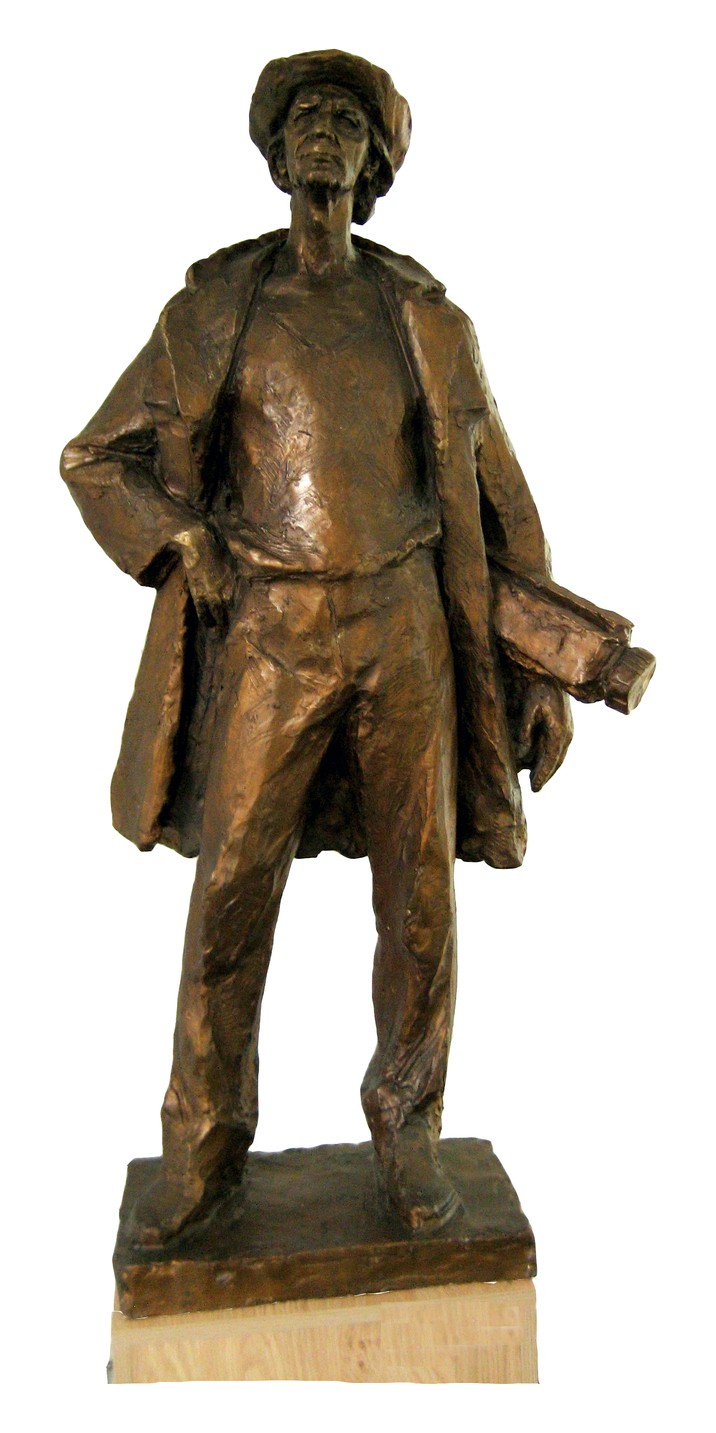 Plastika Karla Plicku